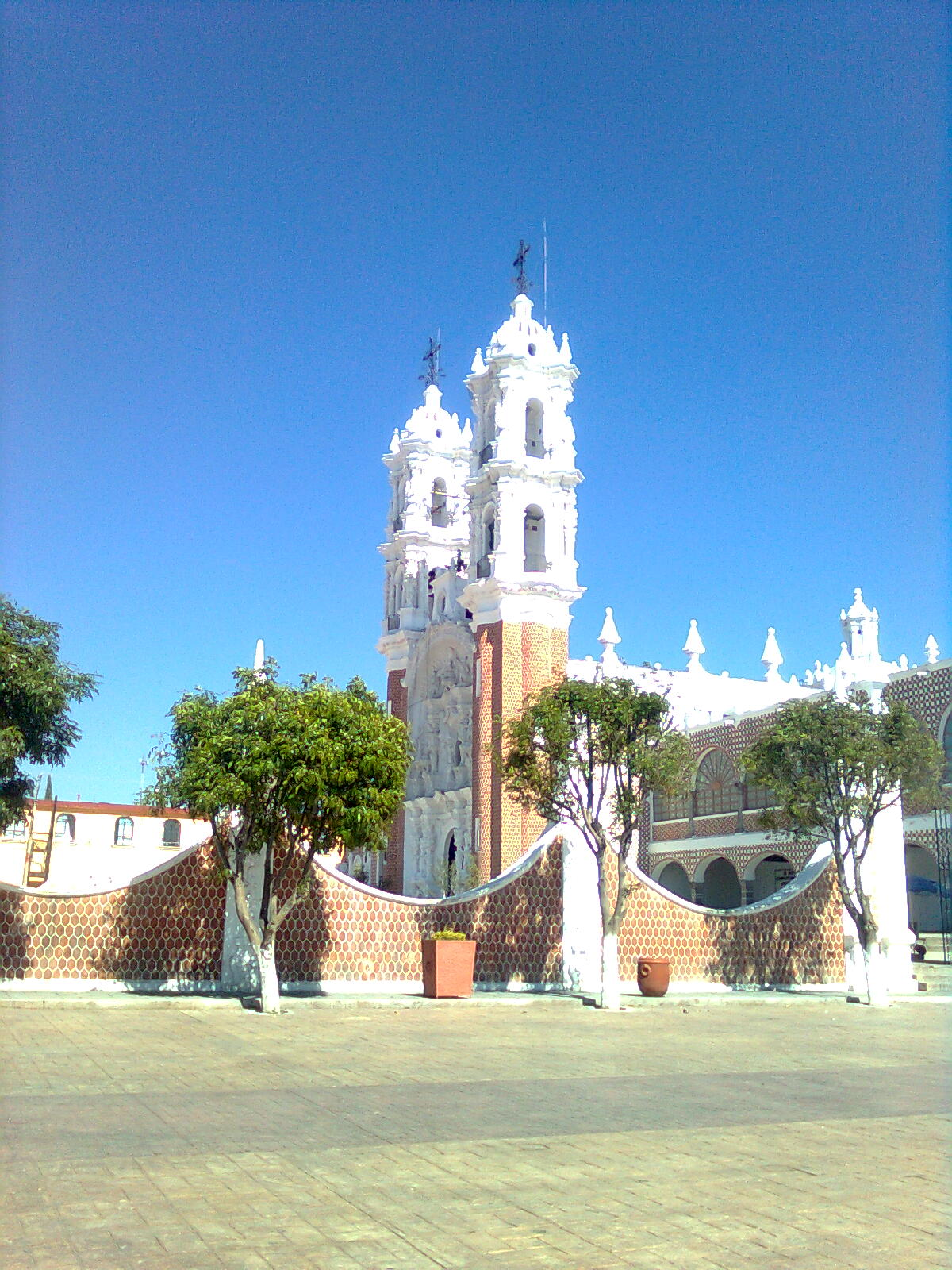 La basílica de Ocotlán, situado en el estado de Tlaxcala, así como en el municipio mismo, es uno de los ejemplos más representativos del estilo barroco churrigueresco en México. Sus orígenes se remontan, desde la aparición de la Virgen María ante Juan Diego Bernardino, un habitante nativo del lugar, en el que le mandaba que le erigiera algo en donde ella pudiera estar, estas apariciones se pueden apreciar en las pinturas del interior de ella; este edificación data desde le siglo XVI. El ladrillo rojo en la vista y el blanoc en sus muros, es muestra inconfundible del estilo barroco-tlaxcalteca. En el interior de ella se puede apreciar el magnífico trabajo del retablo donde se encuentra la Virgen de Ocotlán